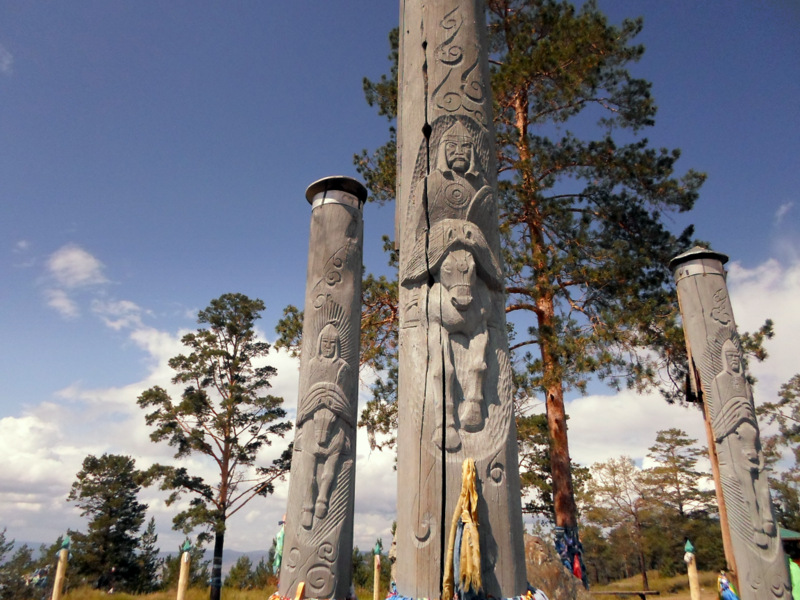 Коновязь Гэсэра. Скульптурный комплекс "Стоянка Гэсэра" на перевале Убиенном близ Гусиноозёрска. Хребет Моностой.